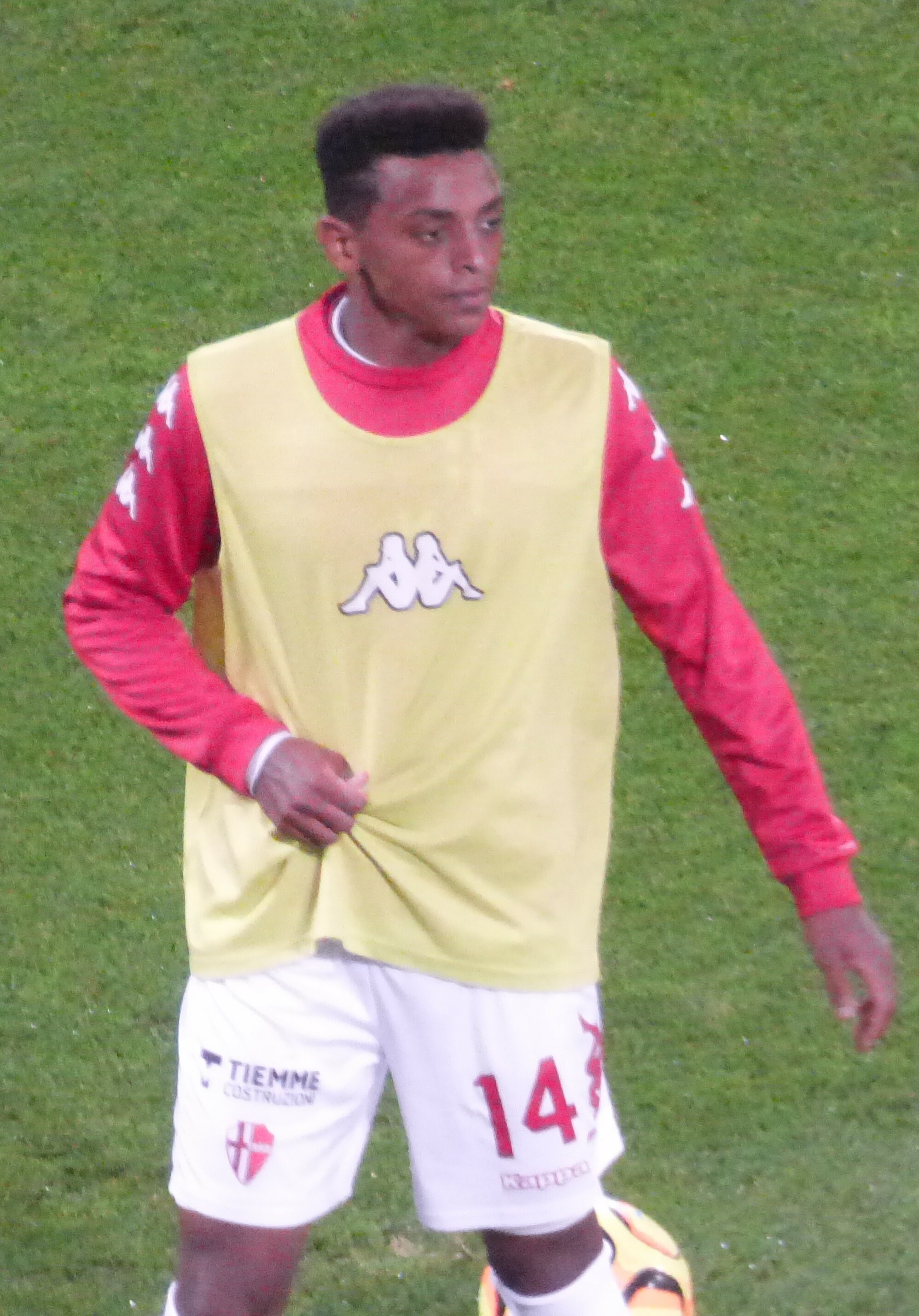 Eyob Zambataro lors du match amical RC Lens - Calcio Padova, le 11 octobre 2018 au Stade Bollaert-Delelis de Lens.